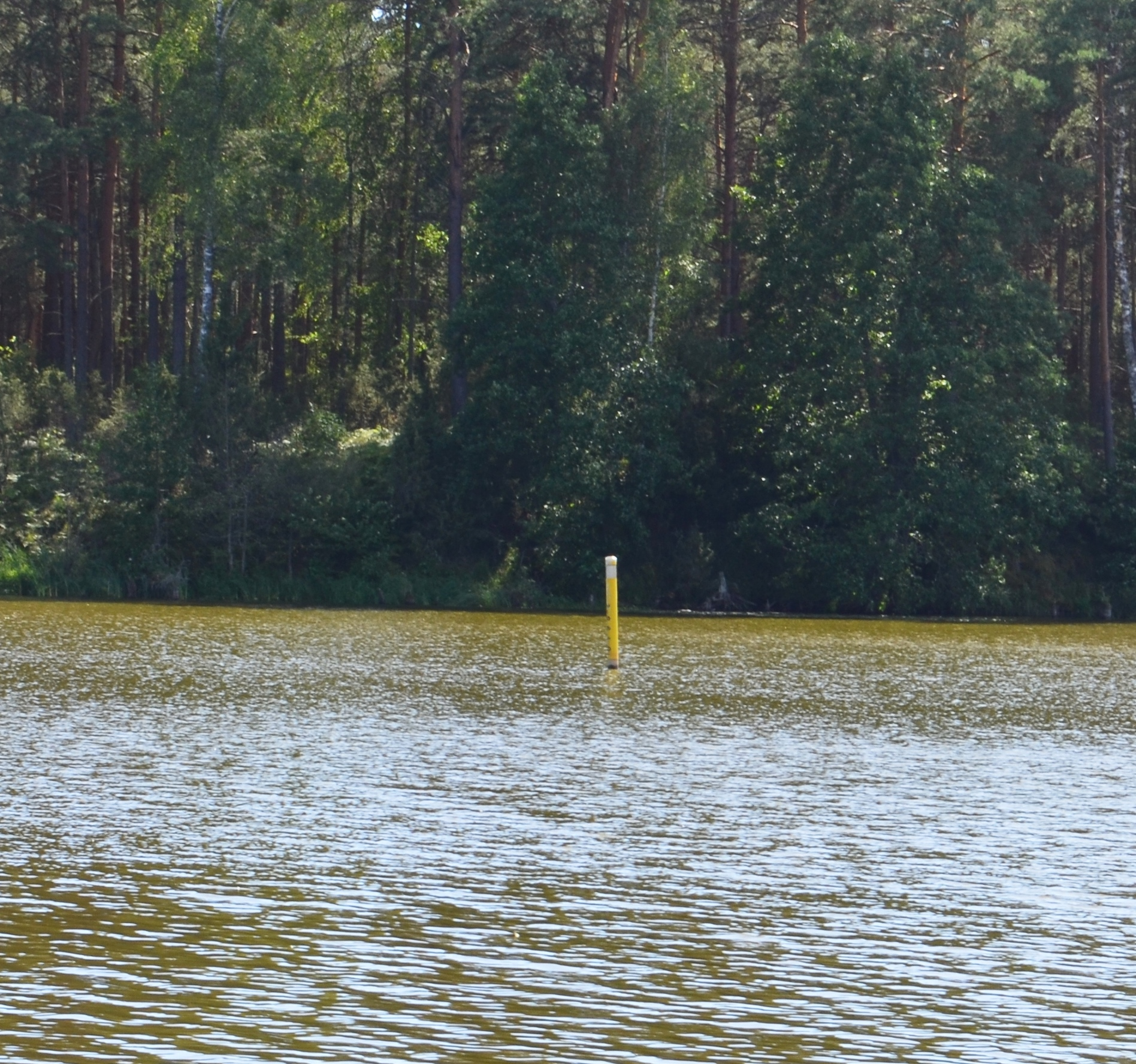 Sienos riboženklis. Grūdos ežeras nuo Lietuvos (Varėnos r.) pusės